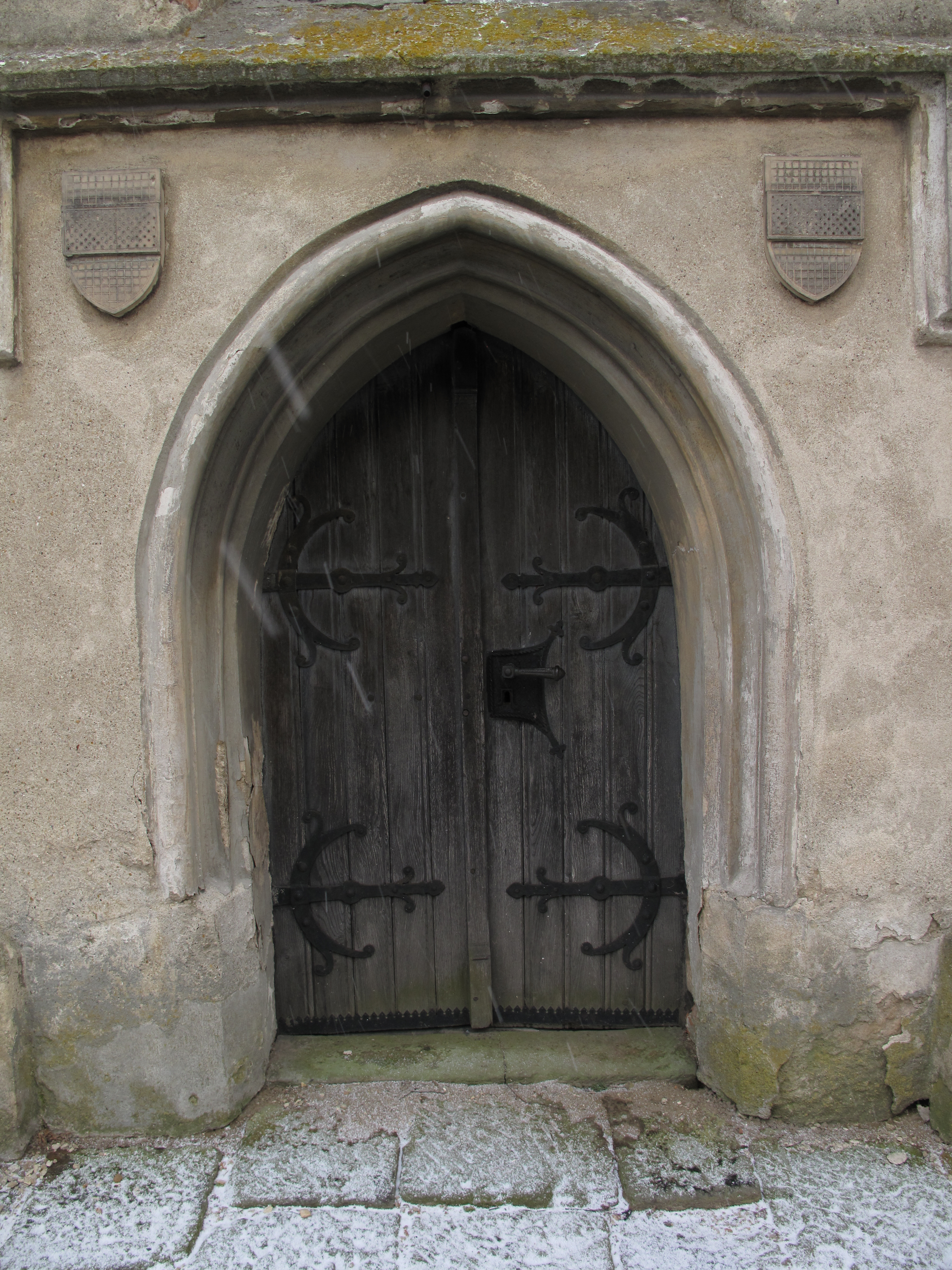 Dveře kostela v Páleči. Okres Kladno, Česká republika.